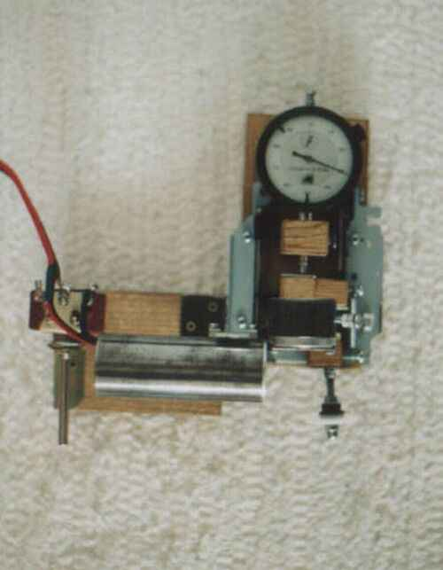 Mérműszer függőleges helyzetben.